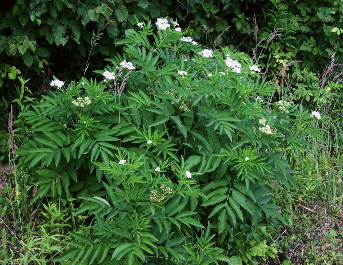 Zwerg-Holunder (Sambucus ebulus), Moschuskrautgewächse (Adoxaceae) - Österreich/Austria/Autriche: Niederösterreich, Hainburger Berge, ca. 2 km E Hundsheim